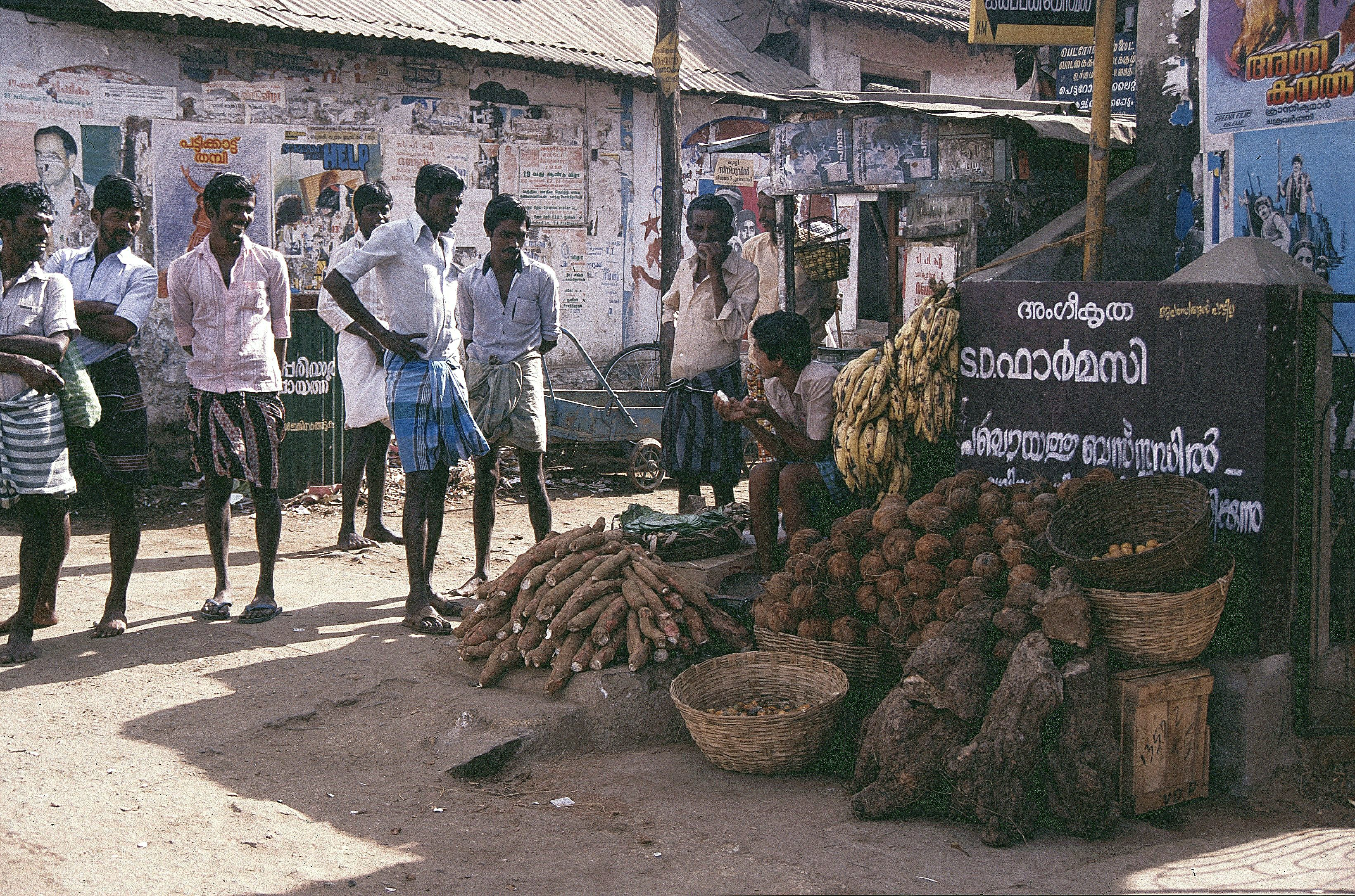 Vandiperiyar Markt